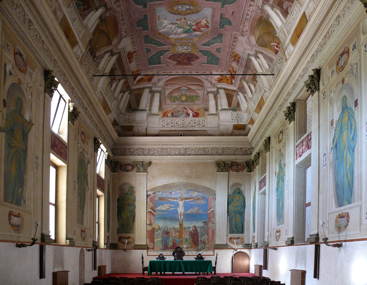 Rodengo Saiano -refettorio- veduta d'insieme